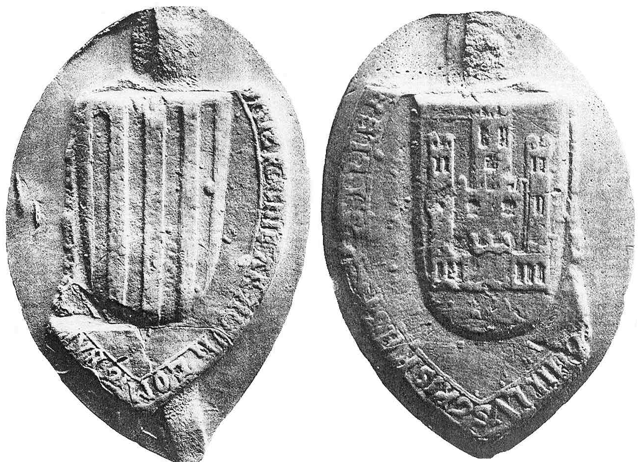 Anverso y reverso del sello de la Reina de Aragón Leonor de Castilla (esposa de Jaime I de Aragón). 1224